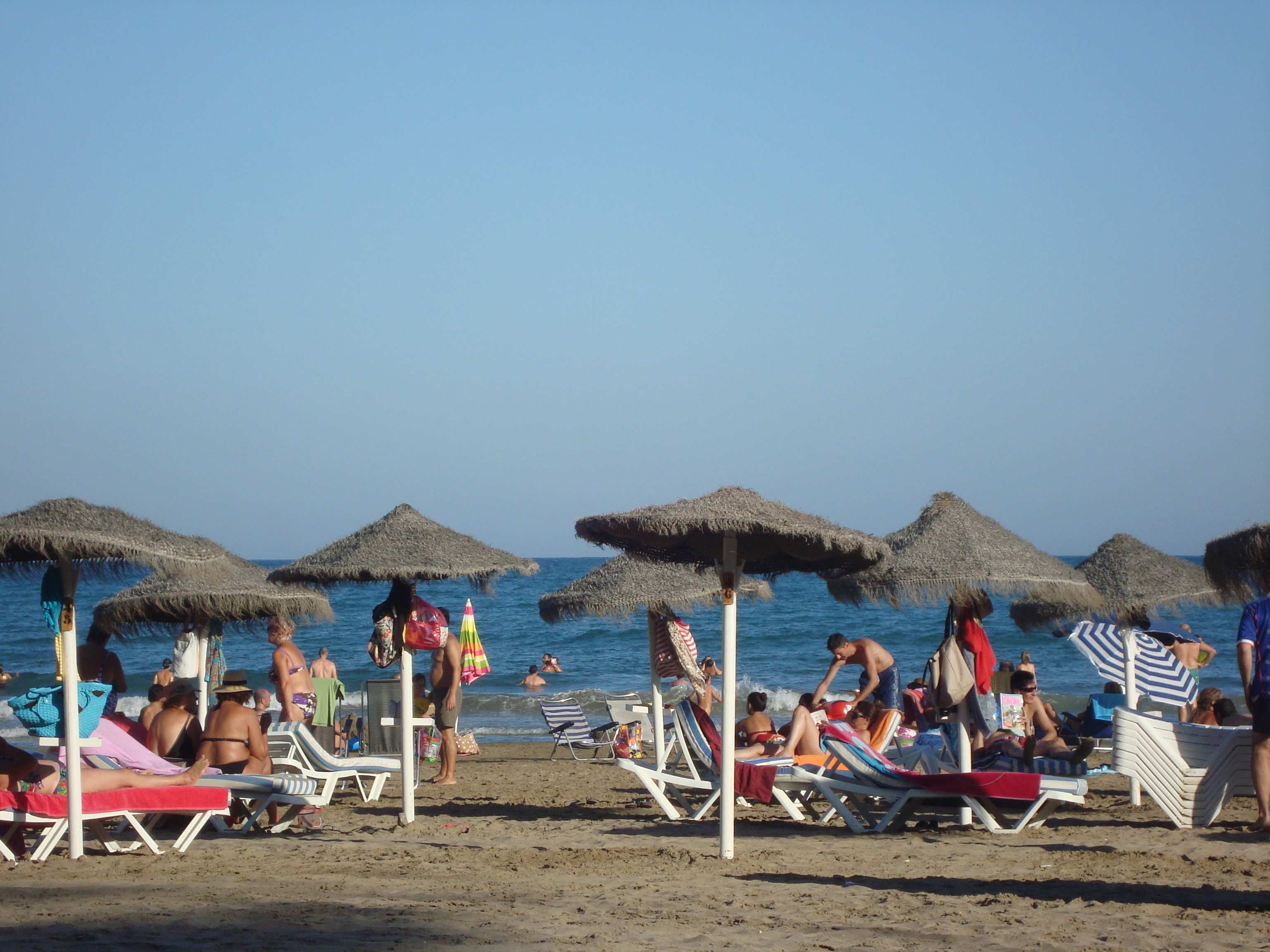 Playa de l'Almadrava de Benicasim/Benicàssim